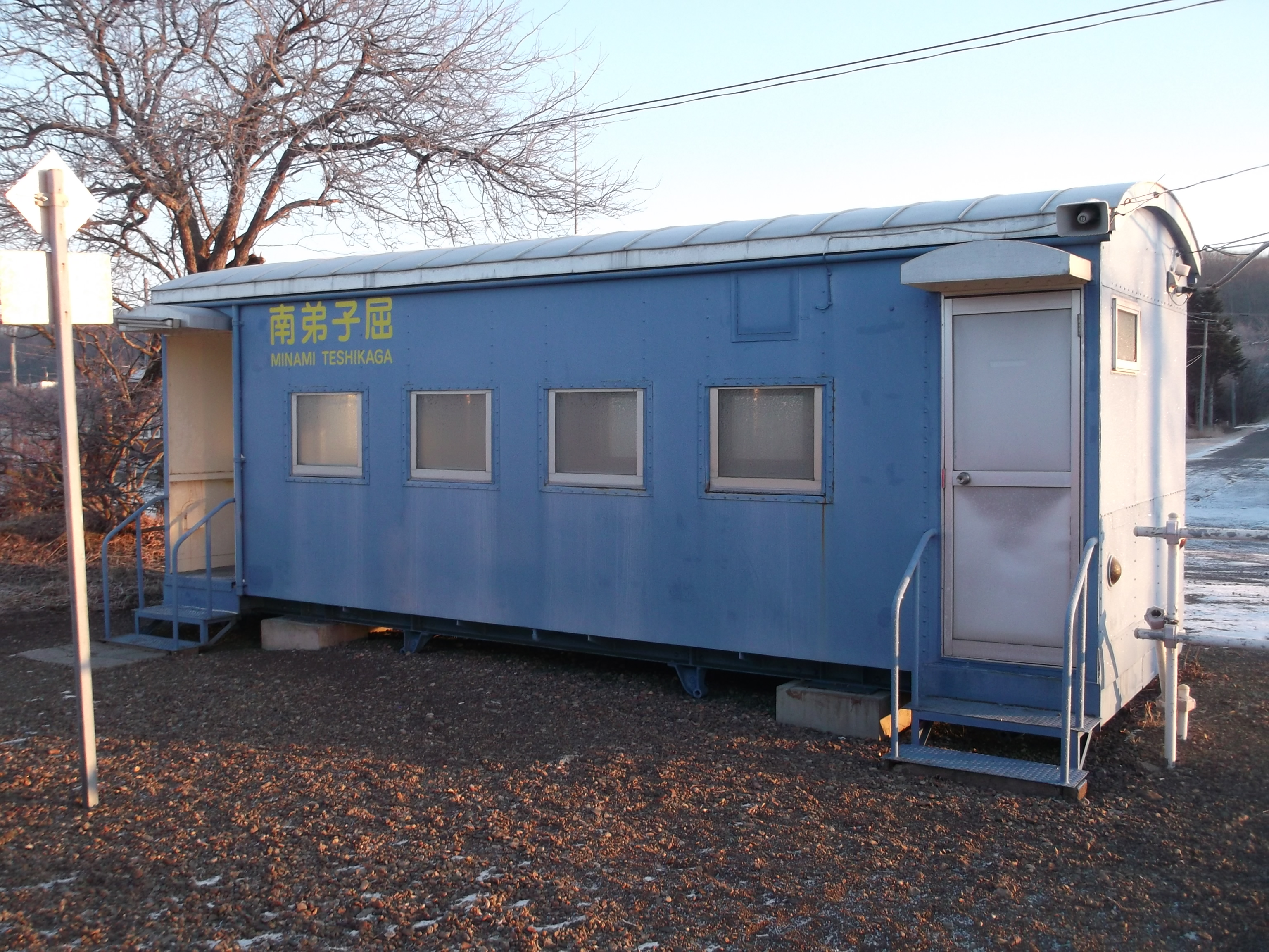 JR釧網本線南弟子屈駅